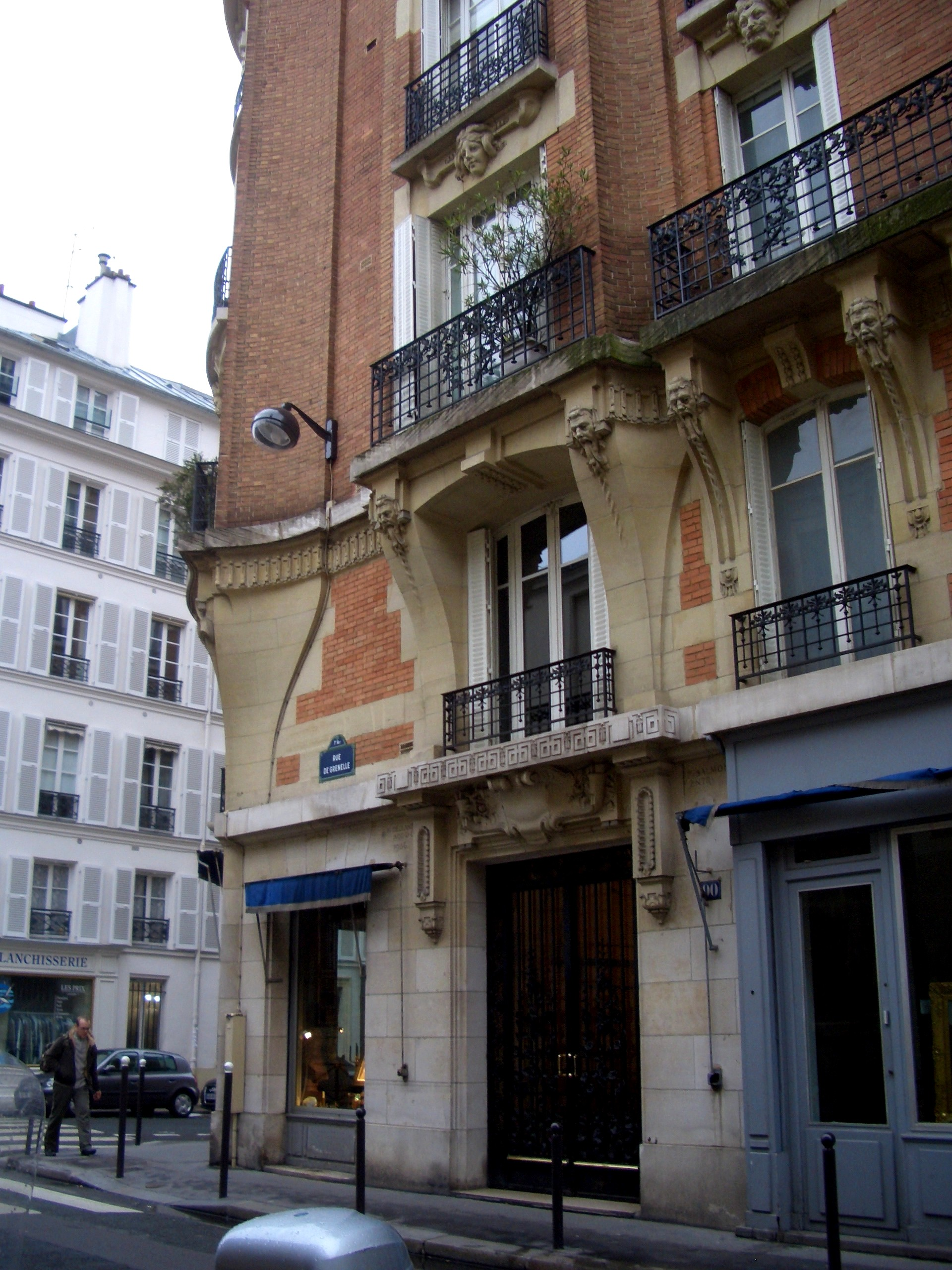 Un palazzo in stile decò a Rue de Grenelle a Parigi